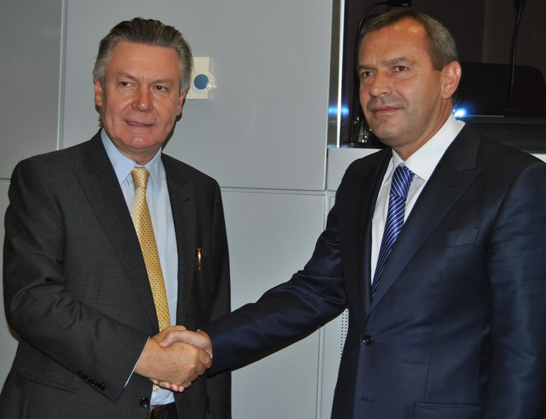 Первый вице-премьер-министр - Министр экономического развития и торговли Украины Андрей Клюев на встрече в среду в Брюсселе с членом Европейской Комиссии по вопросам торговли Карелом Де Гухтом и членом Еврокомиссии по вопросам сельского хозяйства и развития сельской местности Дачианом Чолош обсудили ход 18 раунда переговоров по созданию зоны свободной торговли между Украиной и ЕС. 21.09.2011